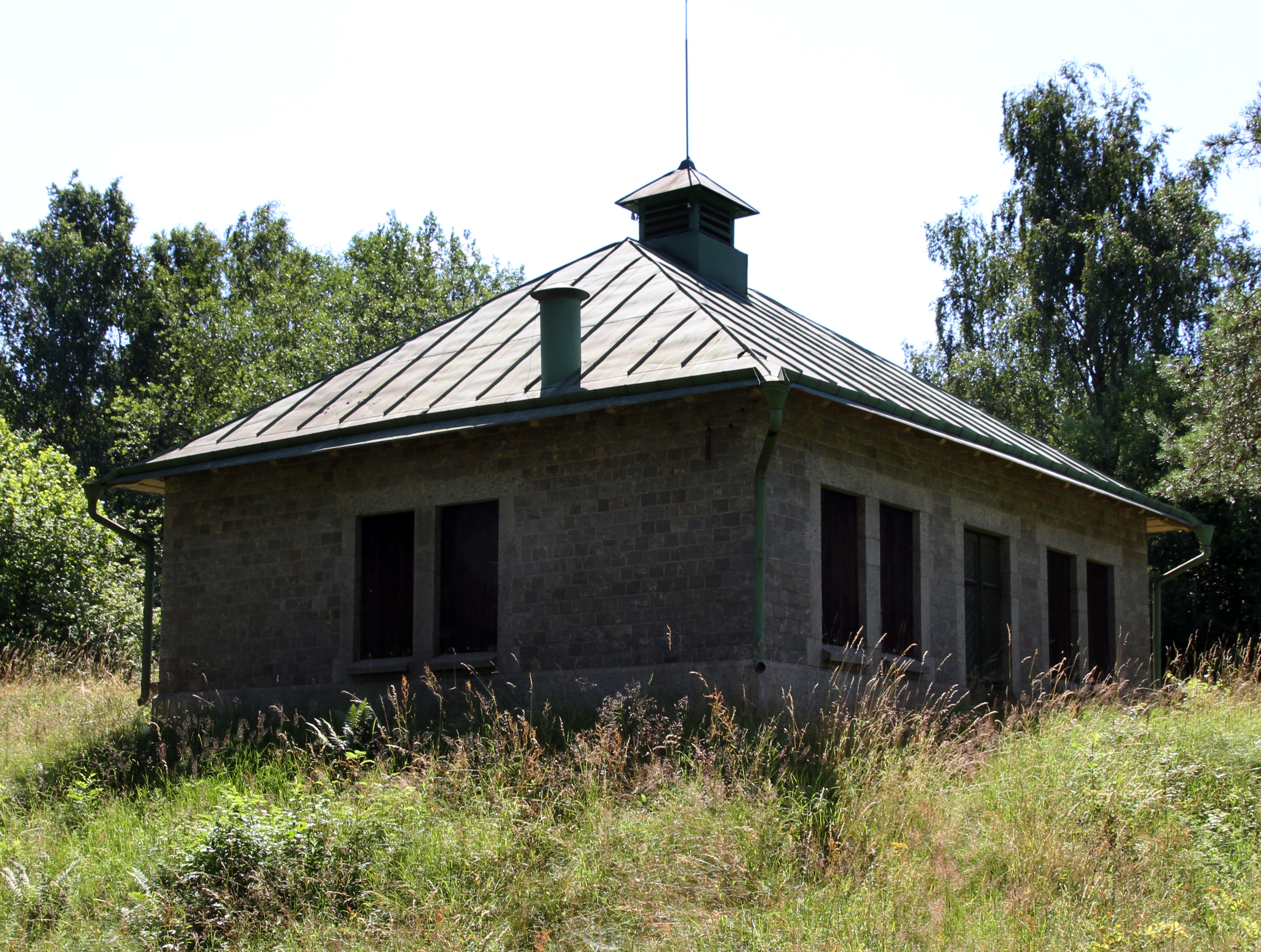 Froarps Vattenverk, Asarum, Karlshamn 17 juli 2015